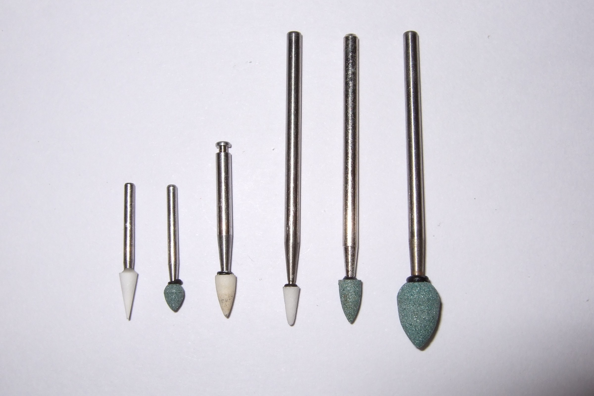 An-chong hó-sè ê bôa-chio̍h